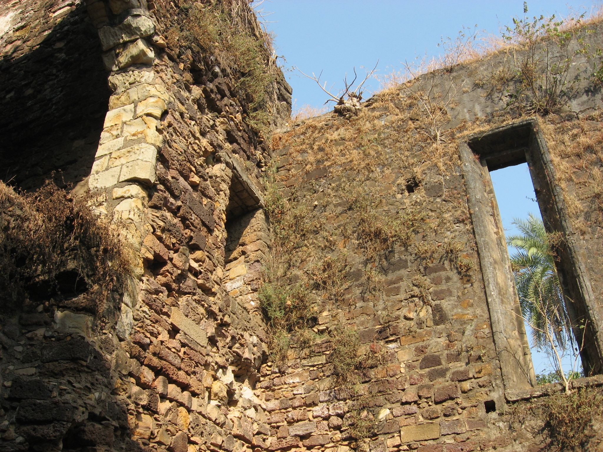 Vasai fort